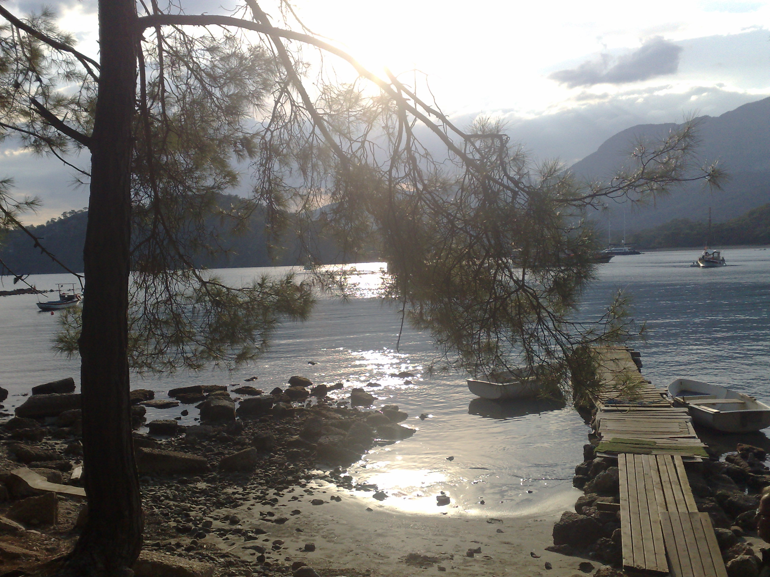 Phaselis, Bucht